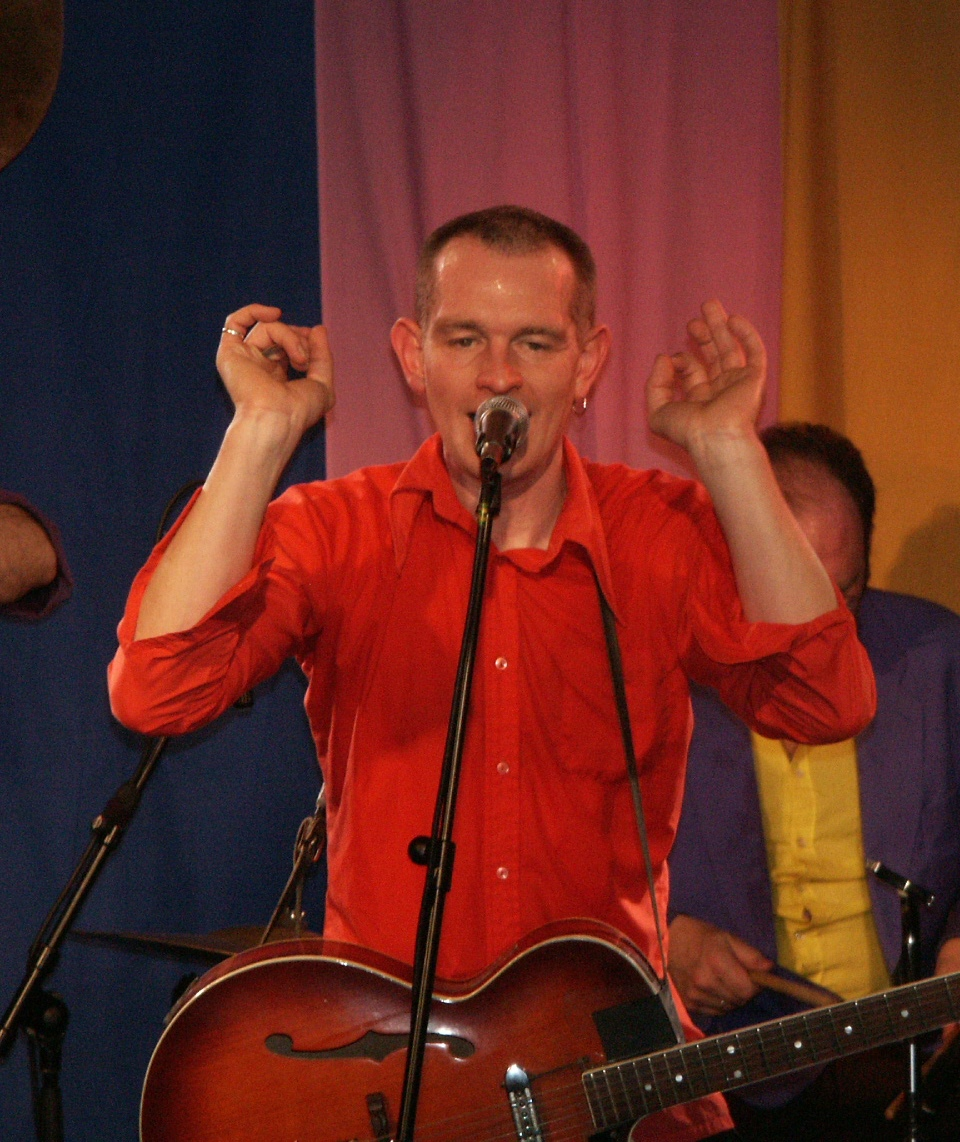 Ferry Heijne, performing with De Kift at ACU, Utrecht, The Netherlands in 2006.